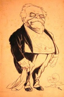 Adolfo Jorge Bullrich (Buenos Aires, Argentina; 30 de diciembre de 1833 - París, Francia; 8 de marzo de 1904) fue un militar y comerciante argentino que llegó a ser Intendente de la Ciudad de Buenos Aires entre 1898 y 1902, durante la primera parte de la segunda presidencia de Julio Argentino Roca.